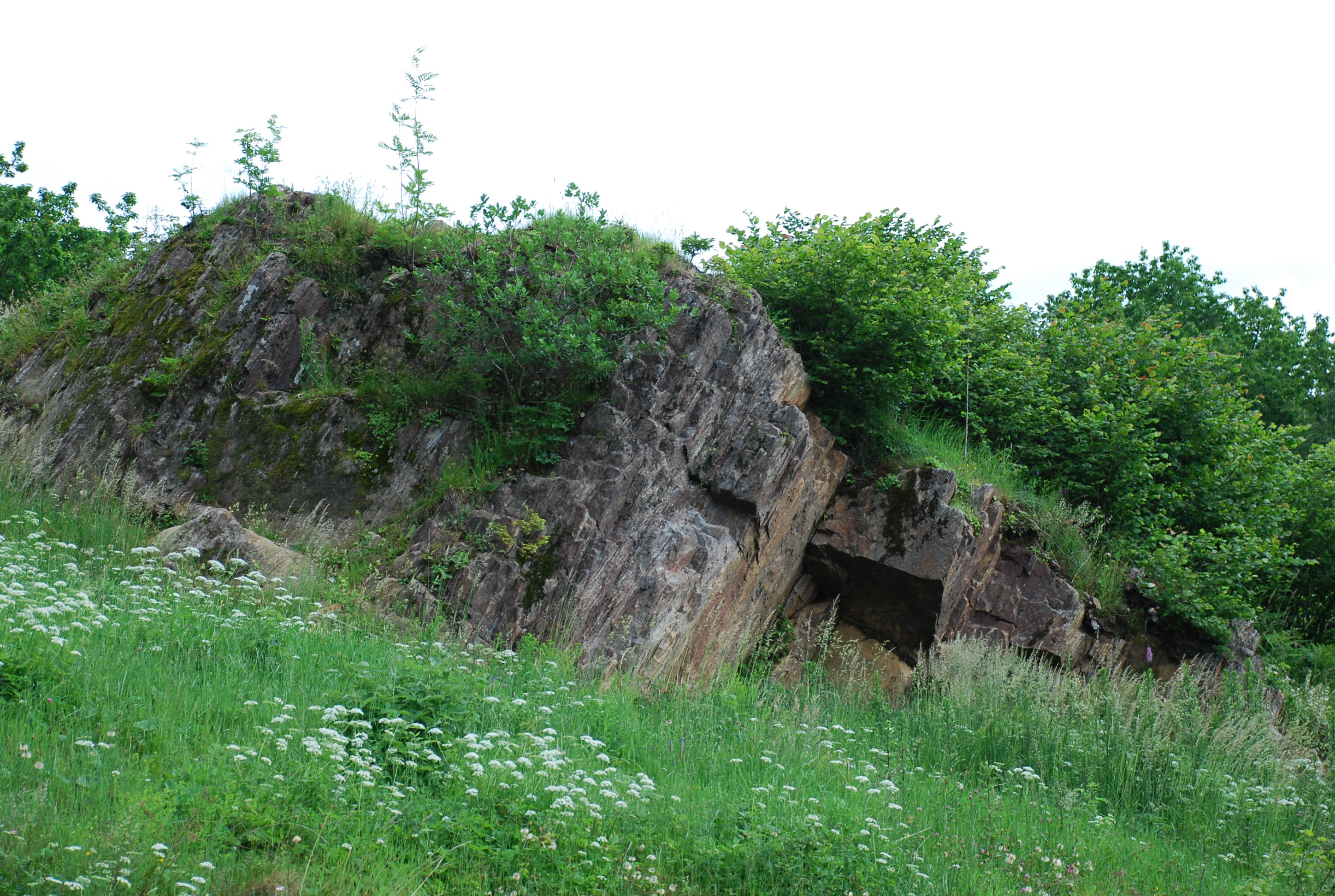 Plattengneisformation in St. Oswald in Freiland